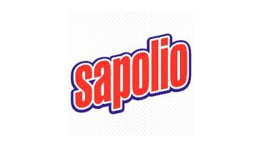 Logotipo Actual de Sapolio